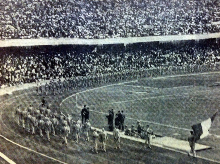 Le delegazioni sfilano durante la Cerimonia d'apertura dei IV Giochi del Mediterraneo di Napoli 1963, svoltasi il 21 settembre 1963, presso lo Stadio San Paolo.